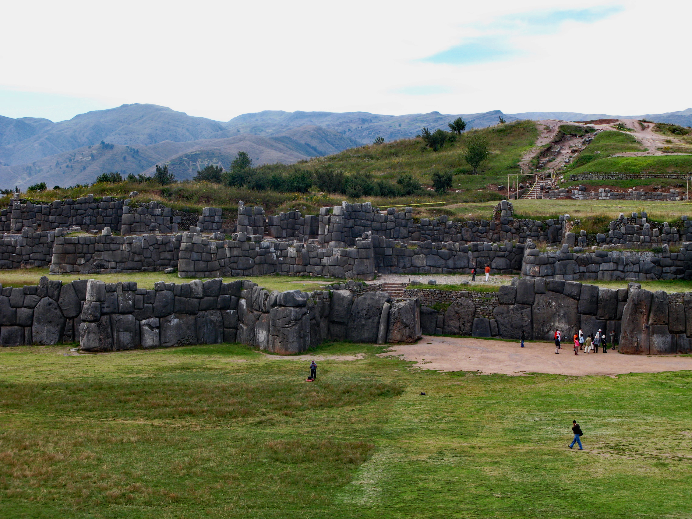 Nad Cuzcom leži inkovska trdnjava Sacsayhuamán